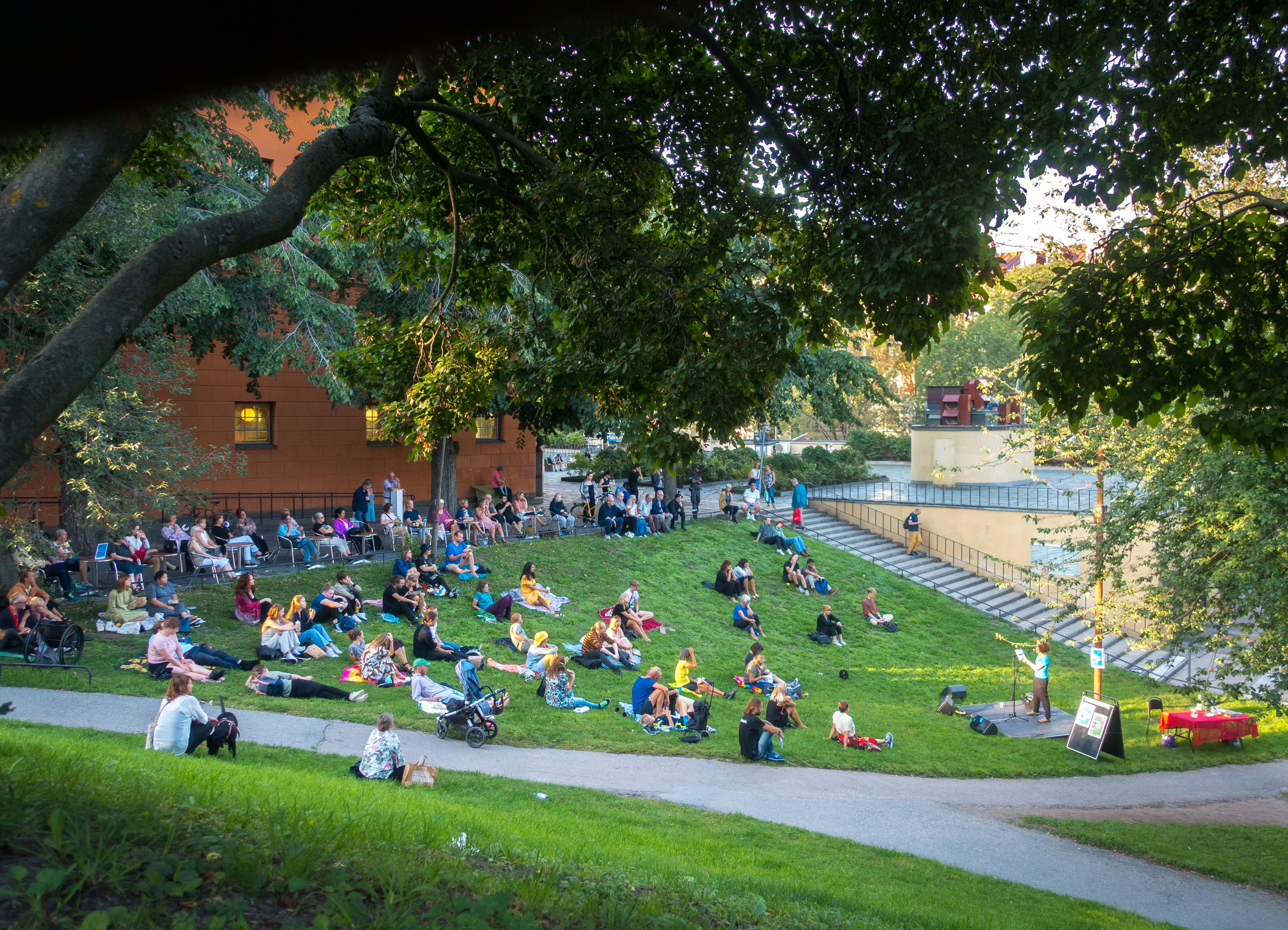 Observatorielunden under Poesi i parken, arrangerat av Stockholms stadsbibliotek den 26 augusti 2019.